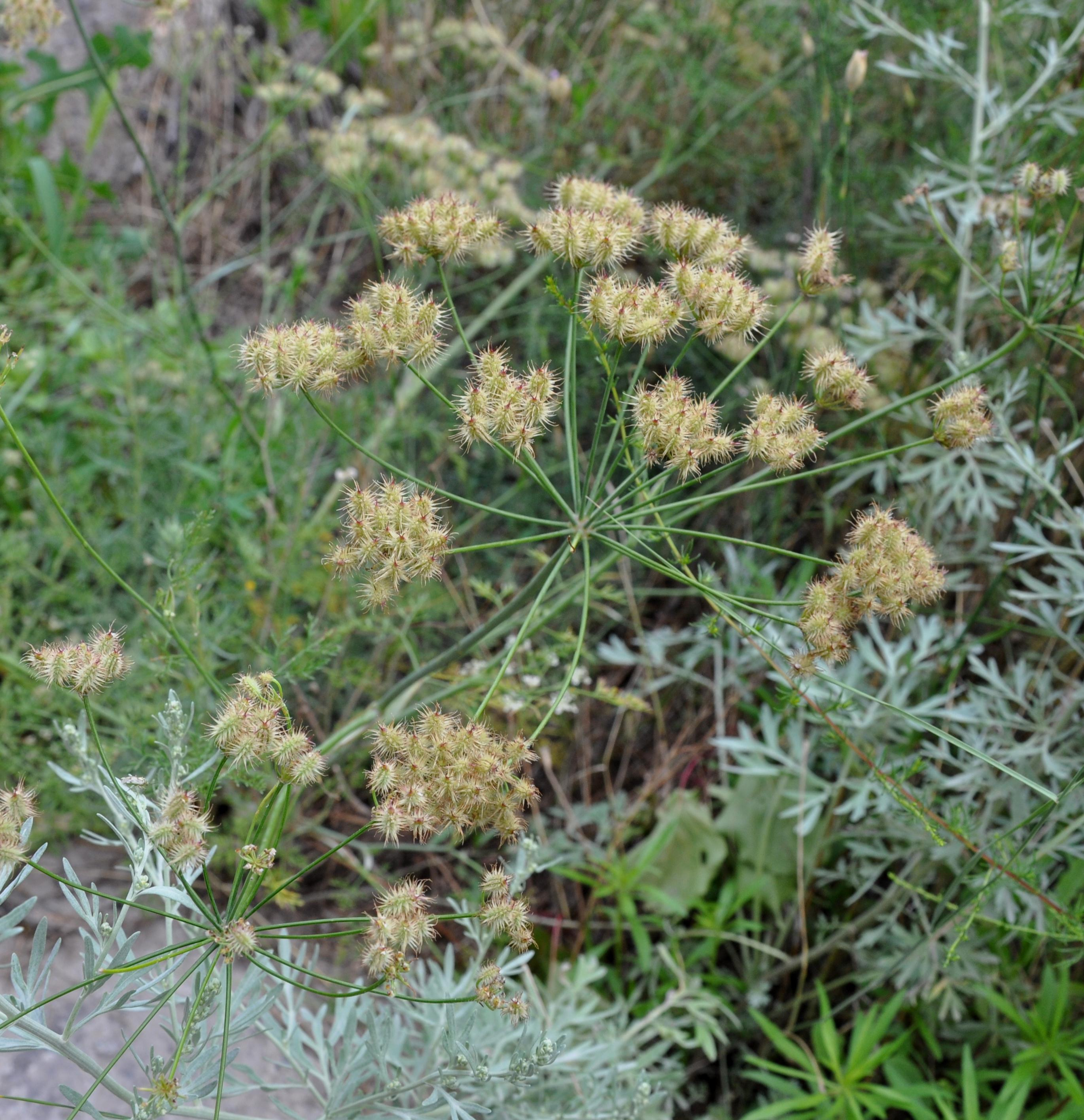 გადაღებულია ტიბერიაში Taken in Tiberias